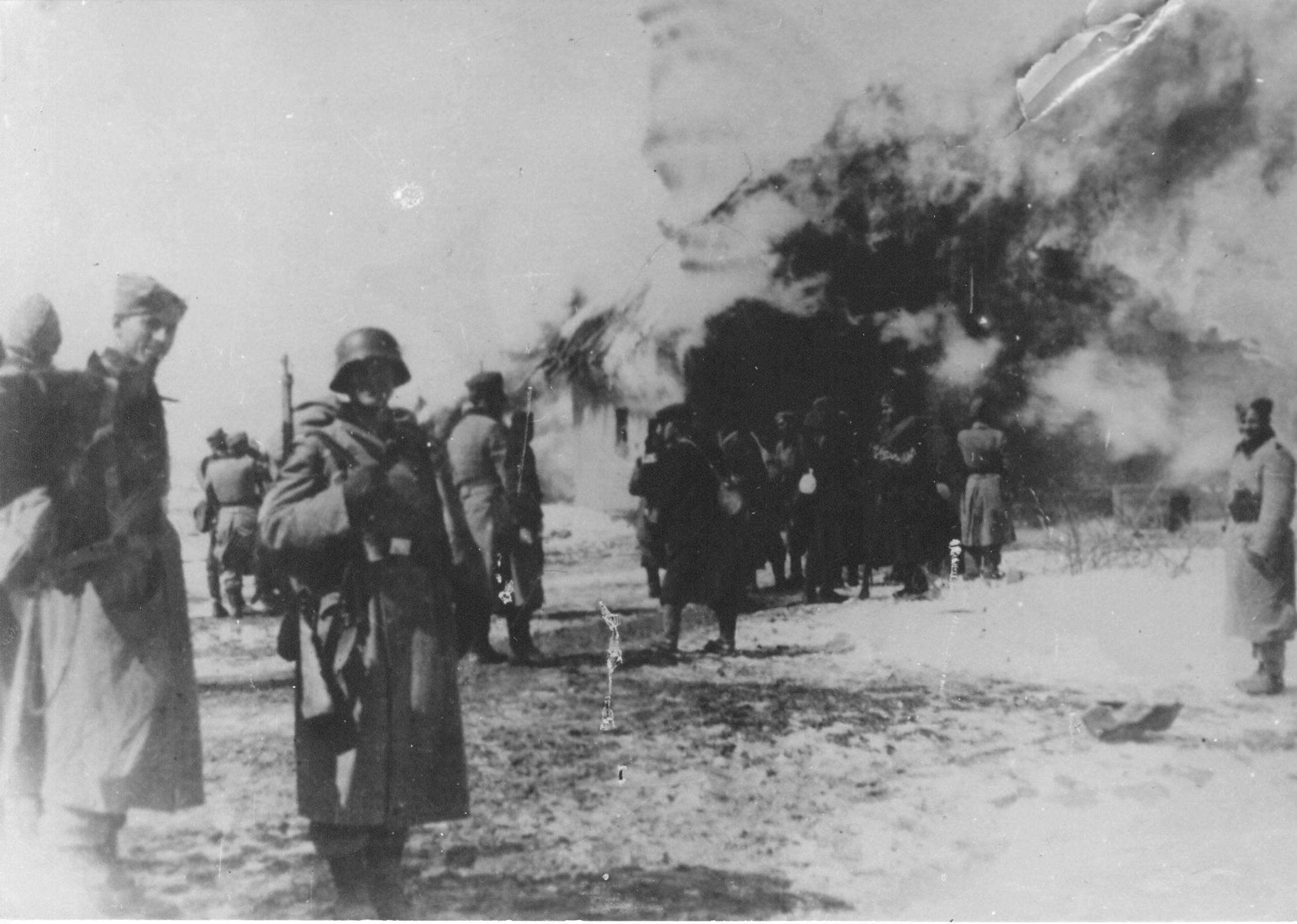 Srpskohrvatski / српскохрватски: Za vreme izvođenja operacija u istočnoj Bosni, početkom 1942. godine, nemačke trupe spalile su čitava naselja.